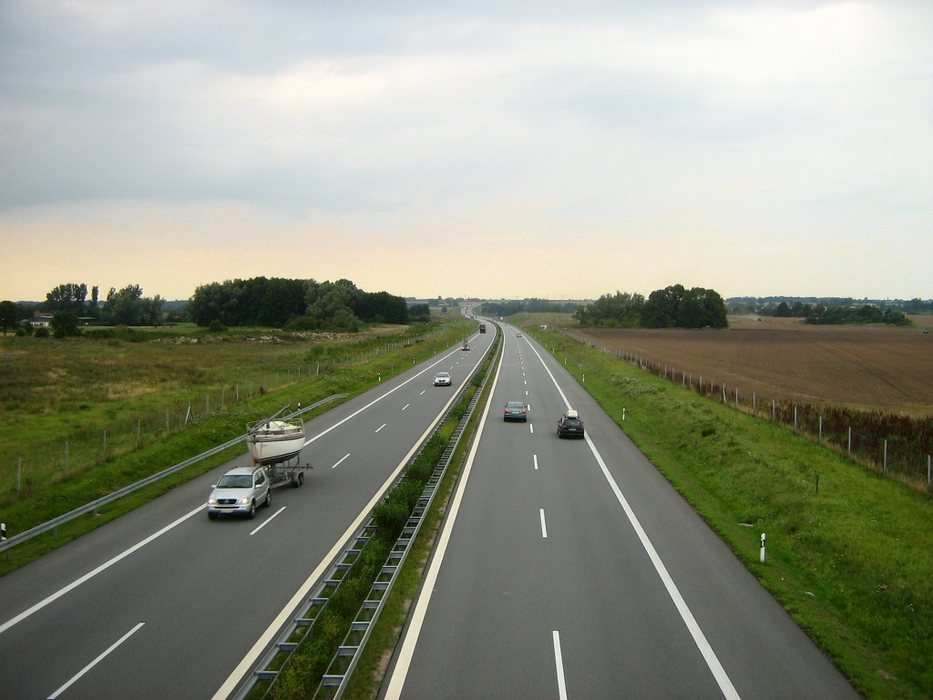 Die Bundesautobahn A20 bei Klempenow (Landkreis Mecklenburgische Seenplatte / ehem. Landkreis Demmin, Mecklenburg-Vorpommern)